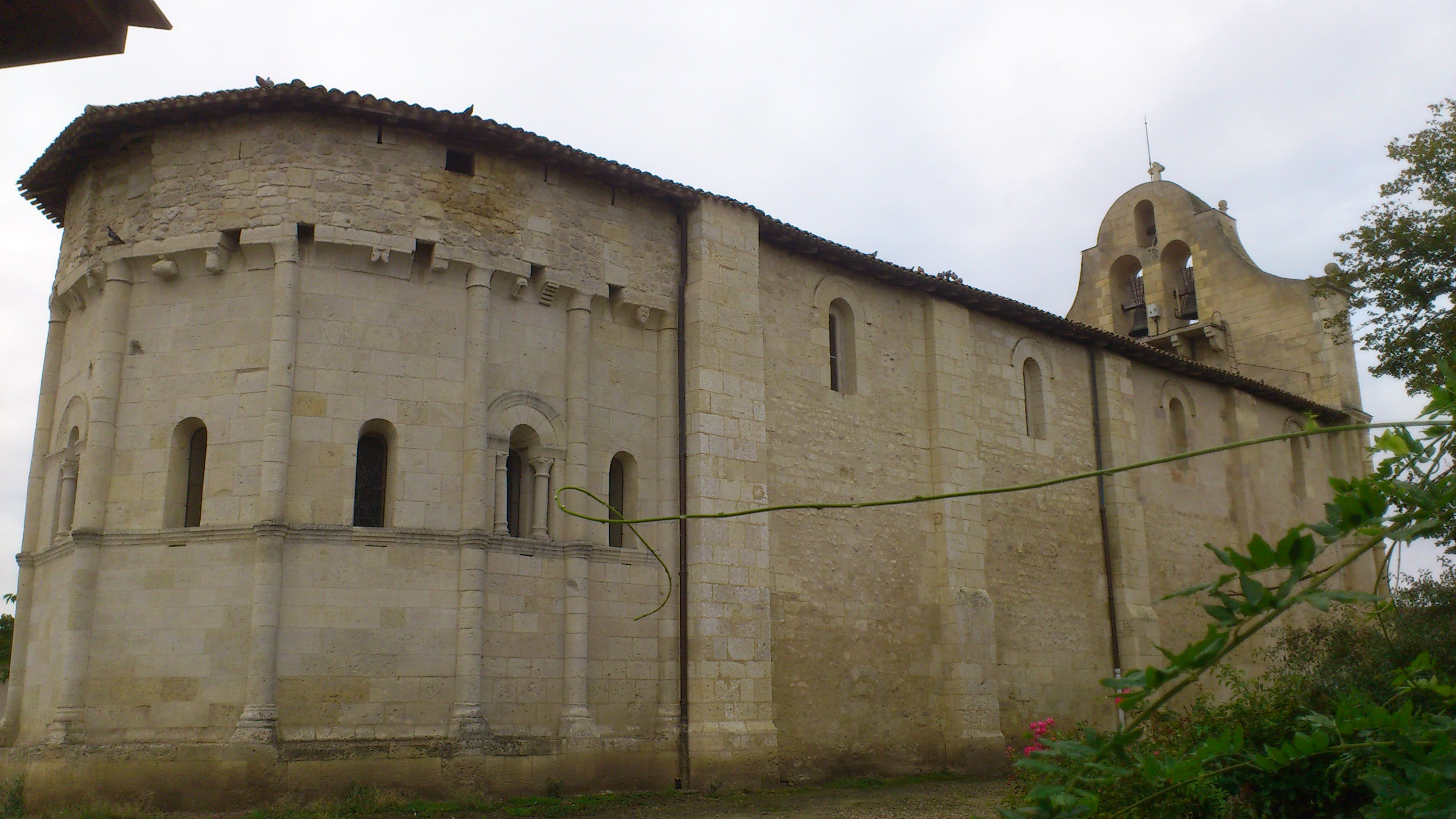 Église Saint-Seurin de Galgon This edifice is indexed in the base Mérimée, a database of the French architectural patrimony maintained by the French Ministry of Culture, under the reference PA00083555.